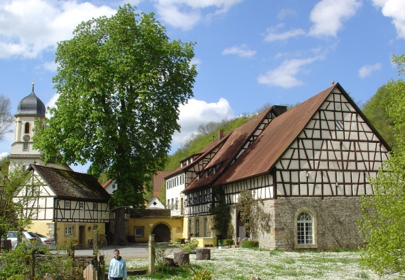 Ehemaliger Gasthof Zum Goldenen Ochsen in Gesamtansicht